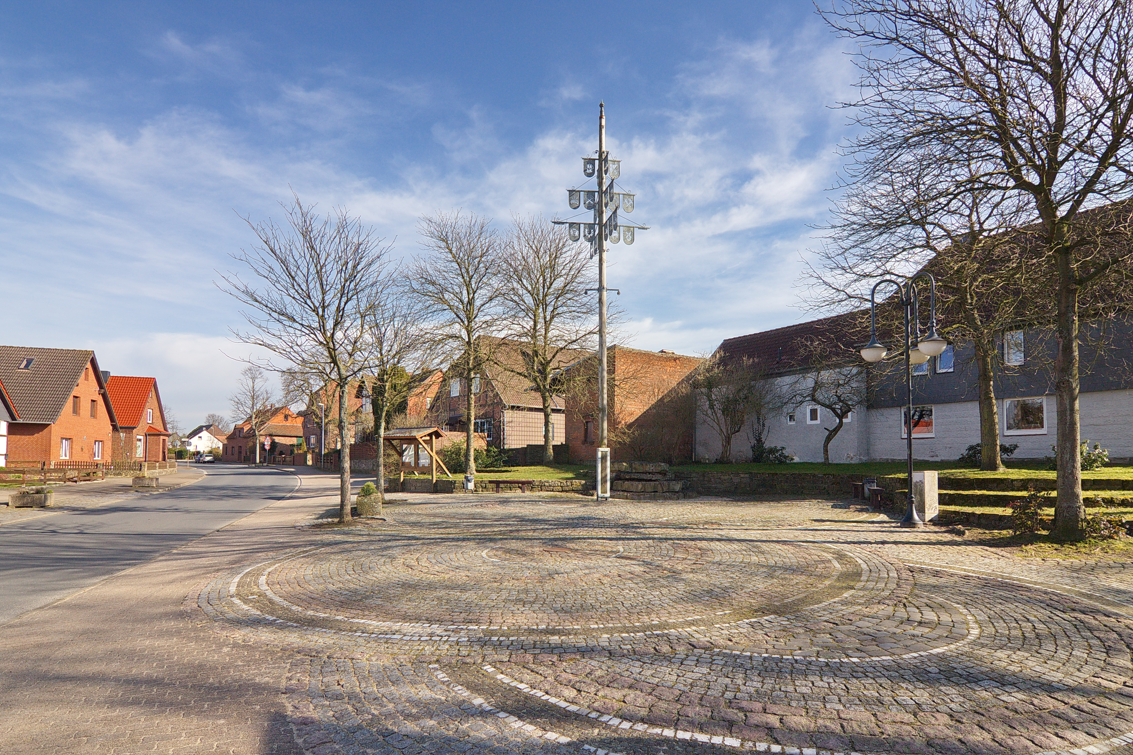 Brackstedt (Wolfsburg), Niedersachsen, Deutschland. Dorfplatz mit Maibaum, links (Haus mit rotem Dach) das ehemalige Lebensmittelgeschäft.